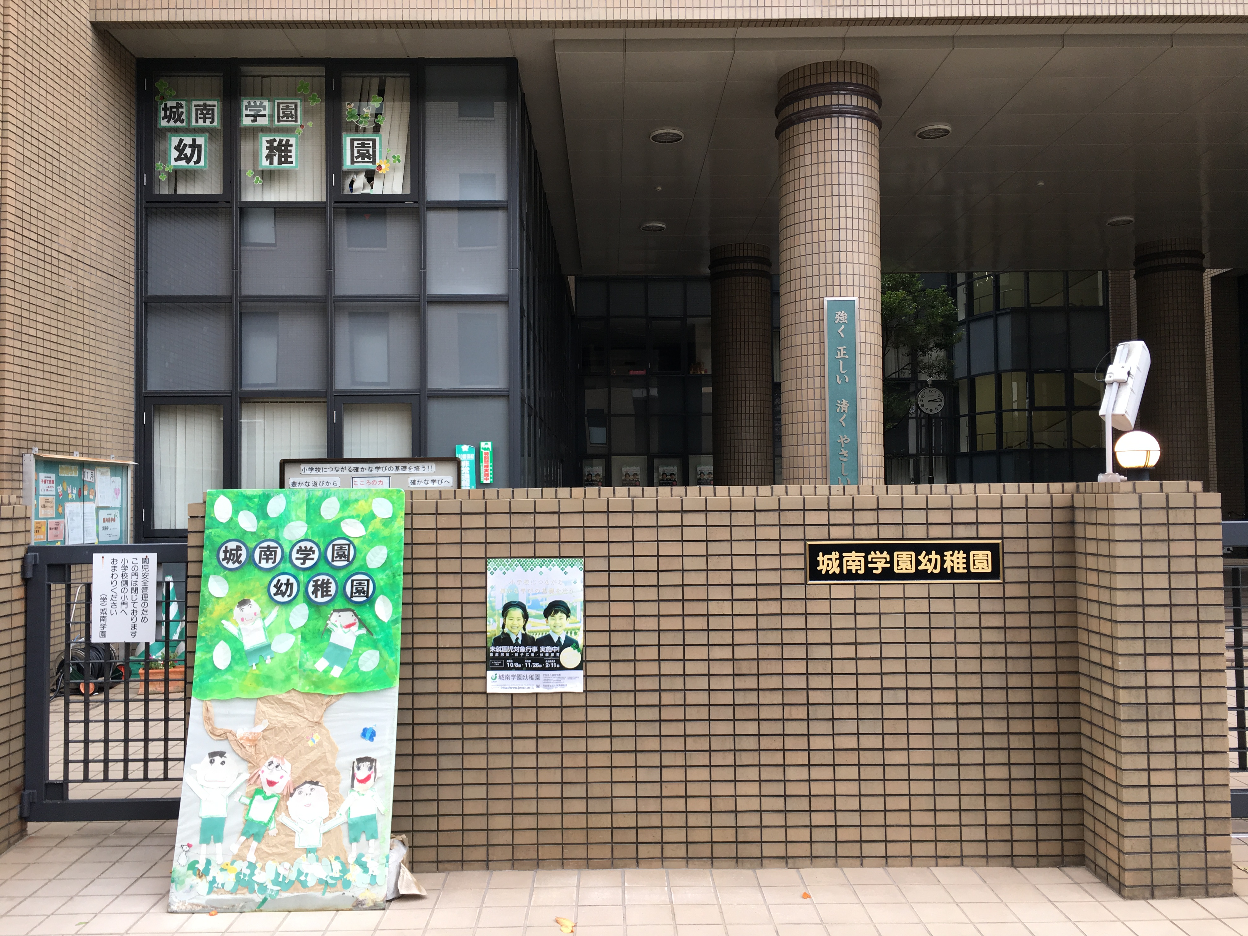 城南学園幼稚園